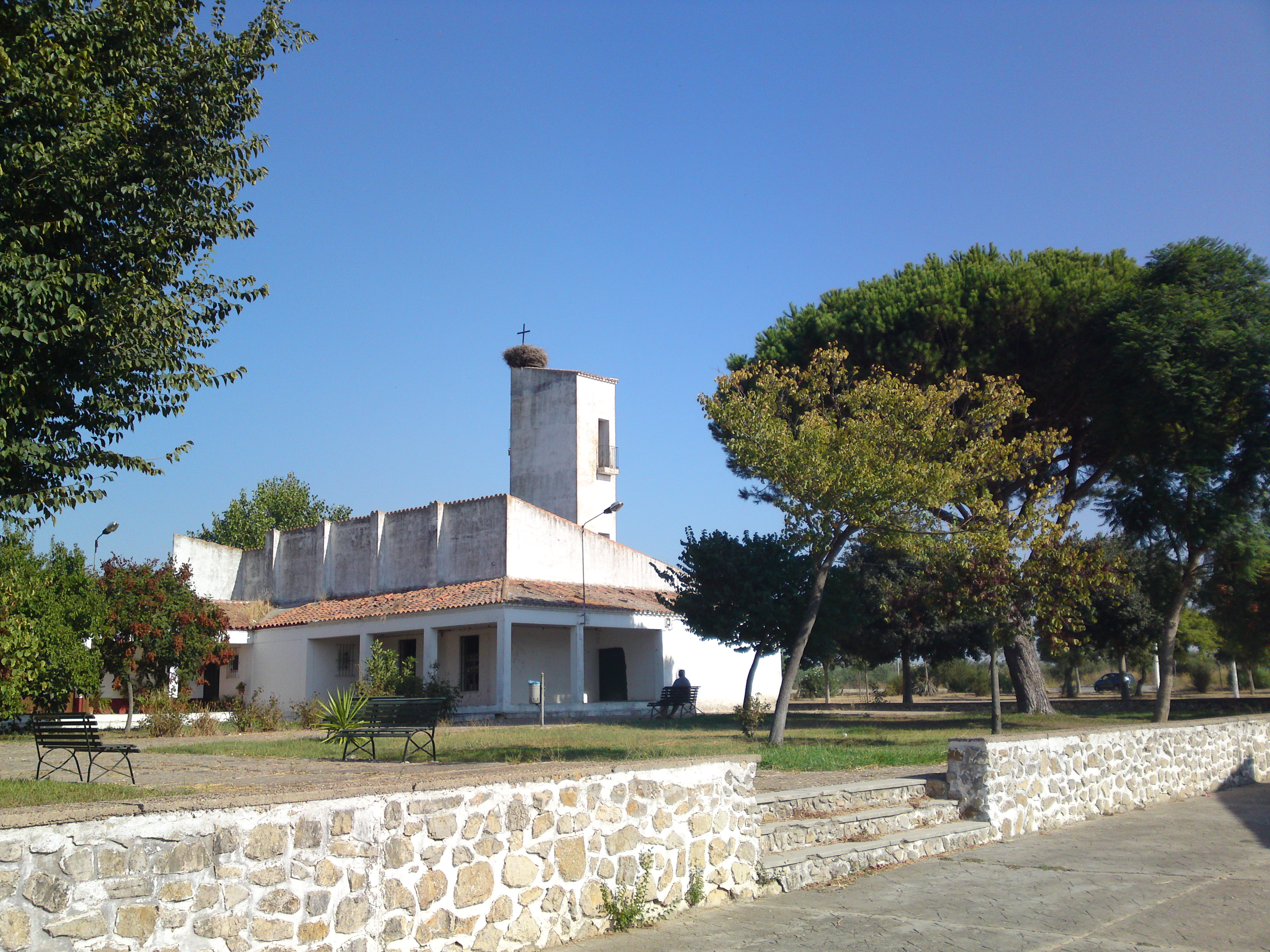 Nucleo de población Adriano perteneciente al municipio de Dos Hermanas. Sevilla - Andalucía - España